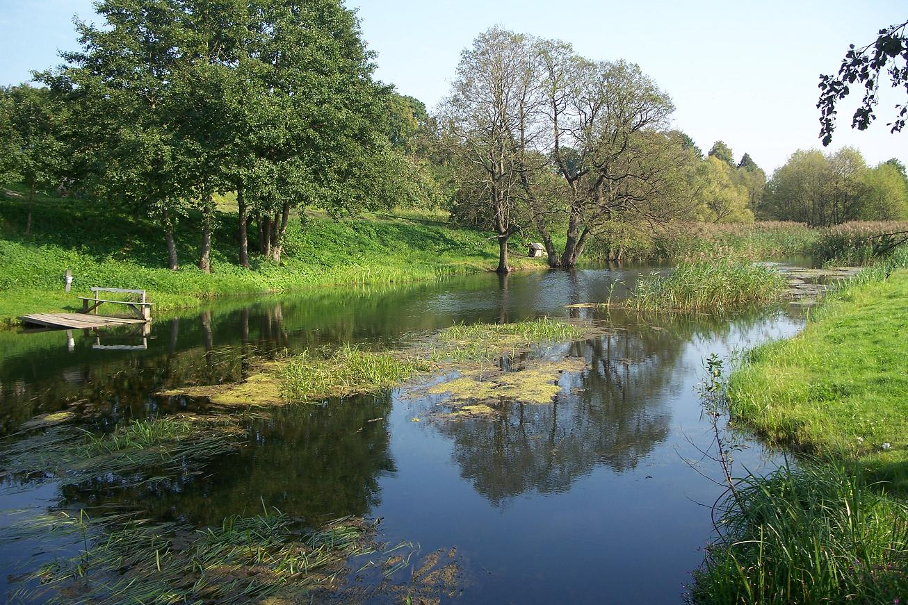 Strėva River in Lithuania near Semeliškės